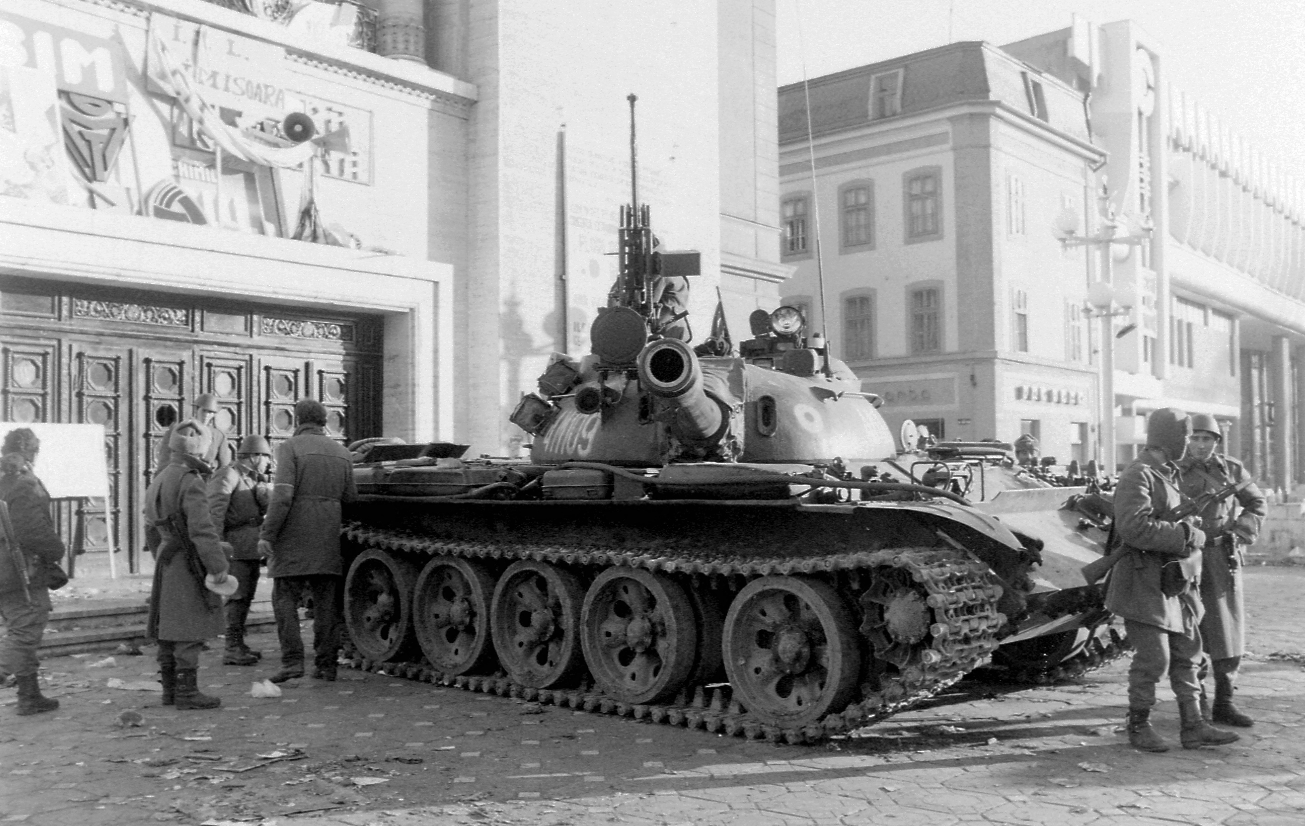 Román Nemzeti Színház és Operaház, T-55 harckocsi. Romániai forradalom. Location: Romania, Transylvania, Timisoara Tags: tank, soldier, Soviet brand Title: Román Nemzeti Színház és Operaház, T-55 harckocsi. Romániai forradalom.